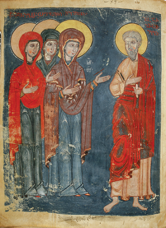 ლარგვისის ზატიკი